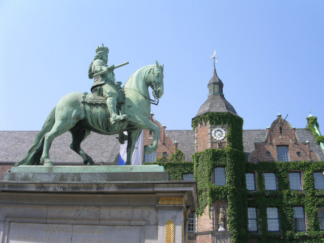 Jan-Wellem-Denkmal, Marktplatz, Düsseldorf